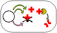 Vignette : Structure et fonctionnement d'€™un opéron poison-antidote. Copyleft La pinte